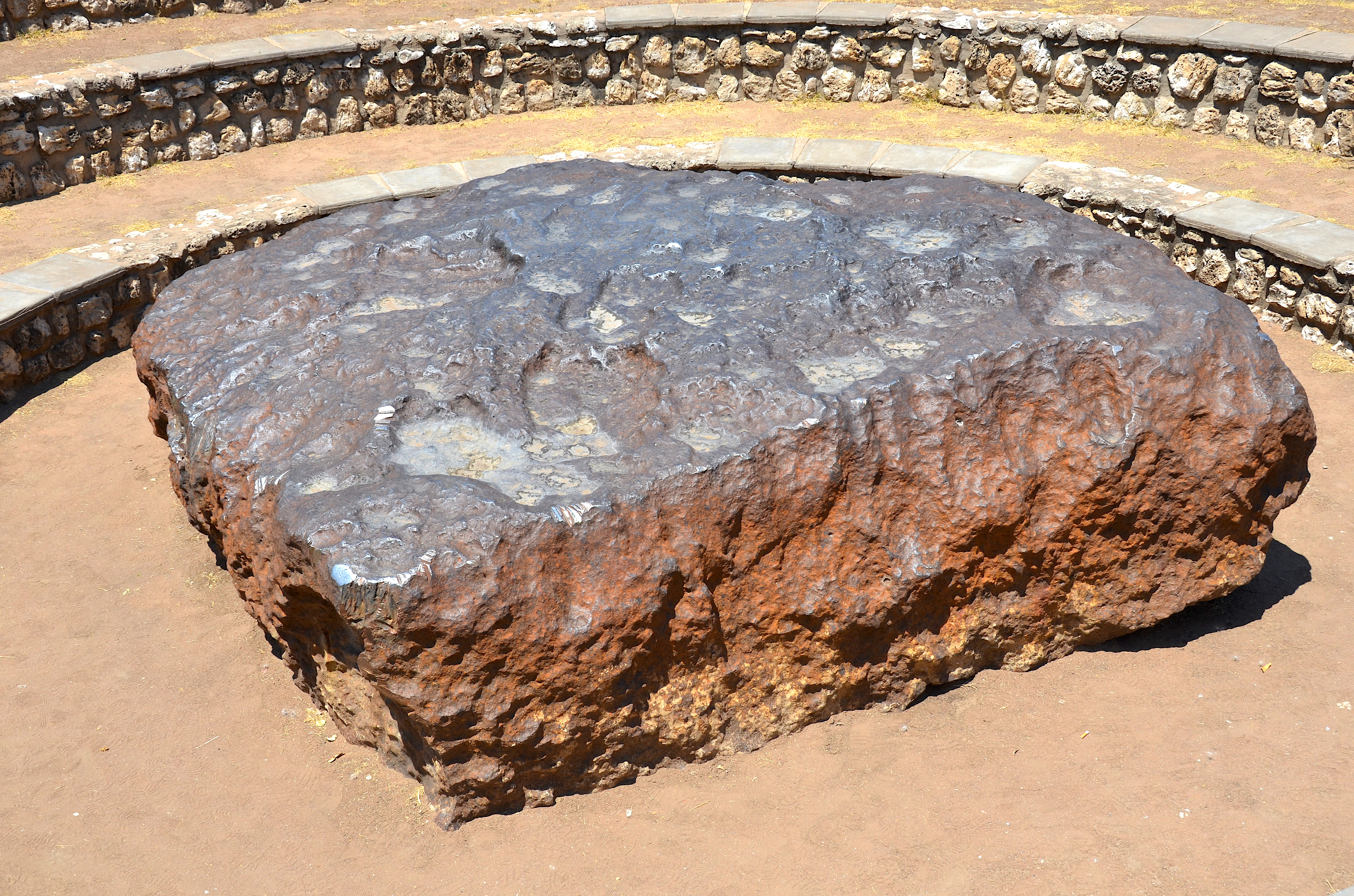 Hoba Meteorit in Namibia (2014)